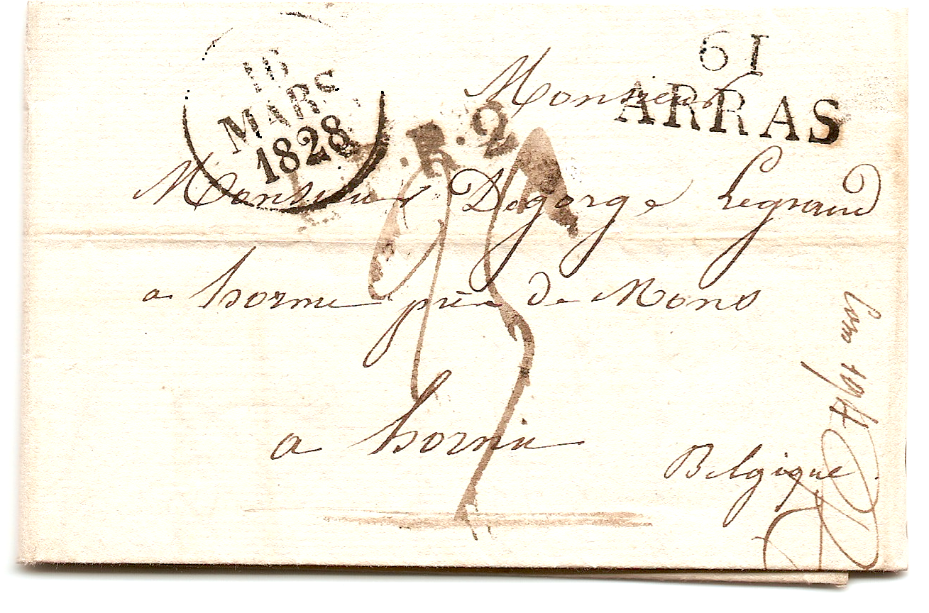 Marque Postale Linéraire 61 Arras 1828